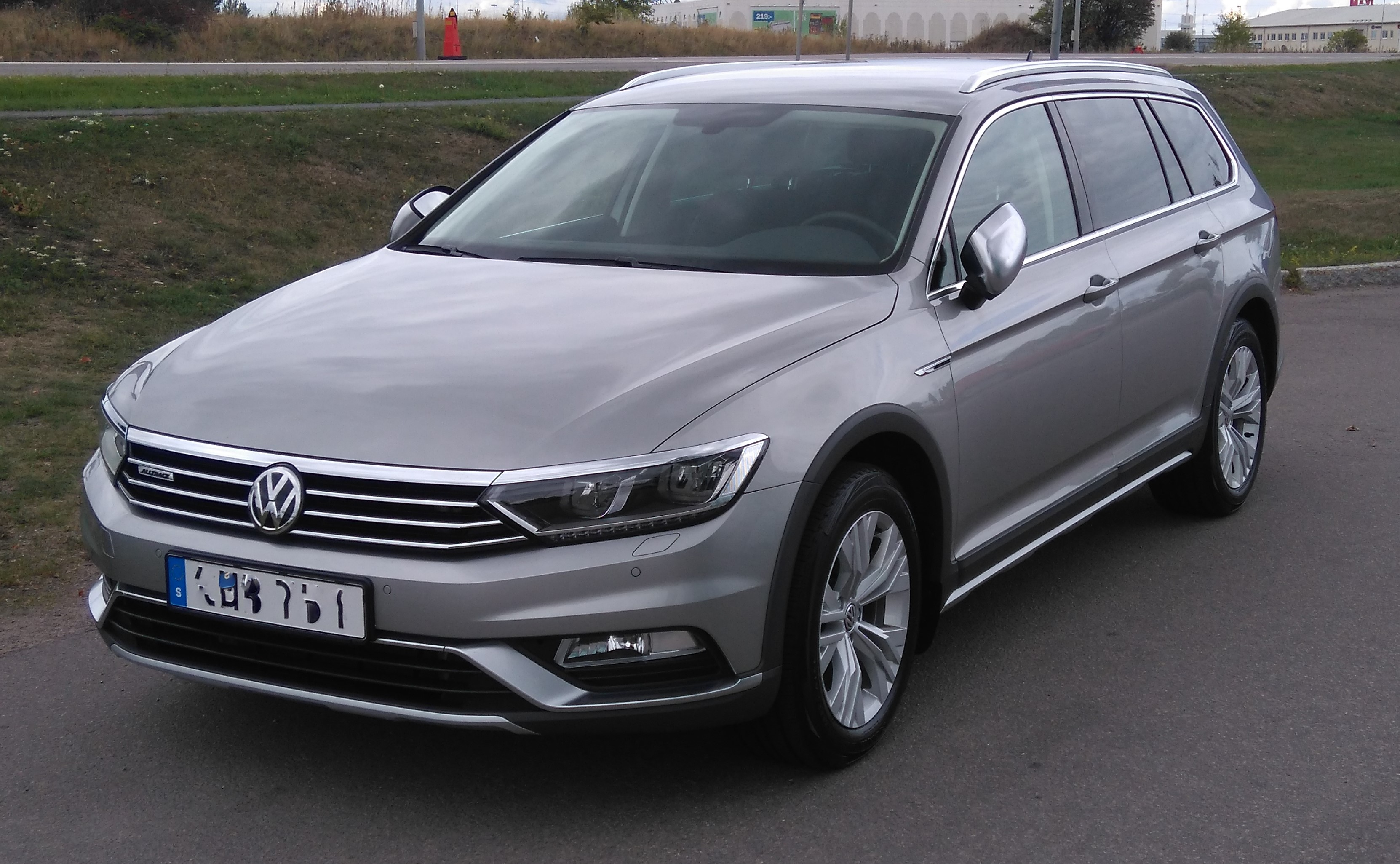 2016 Volkswagen Passat Alltrack